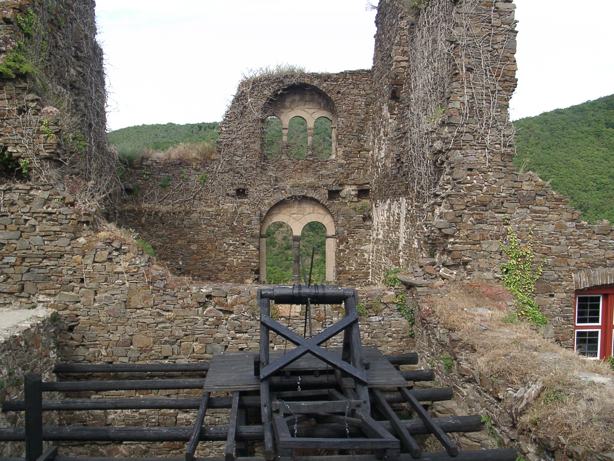 Burg Thurant Innenansicht